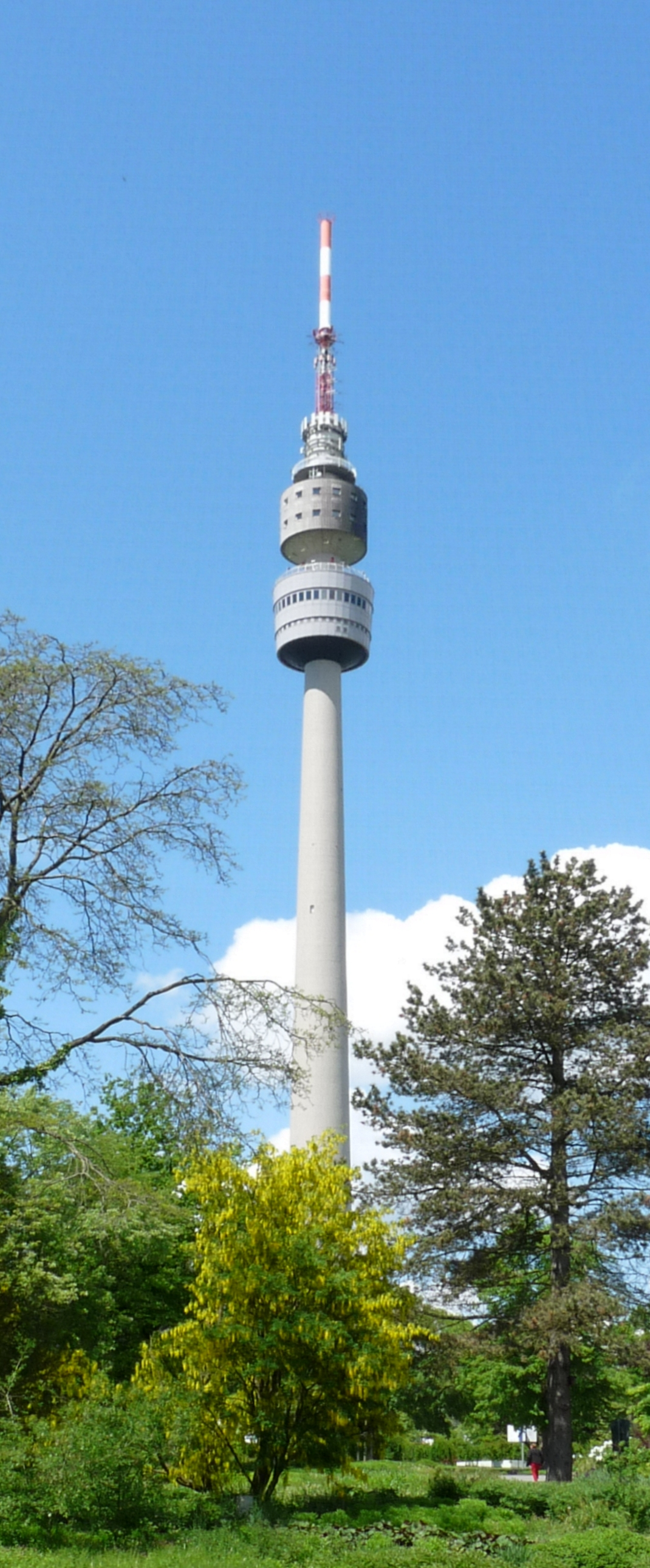 Ansicht des Florianturms in Dortmund vom Westfalenpark